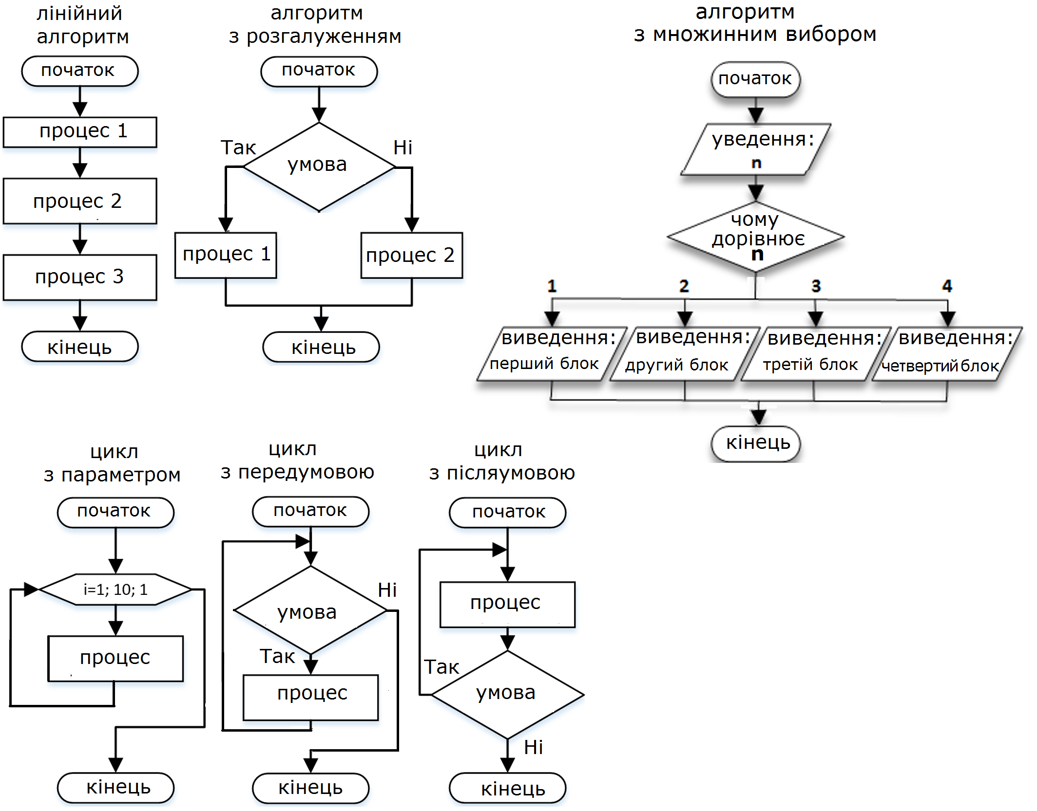 блок-схеми базових алгоритмів